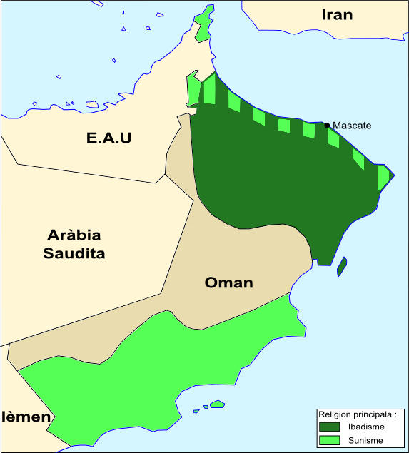 Religions dau Sultanat d'Oman a l'acomençament dau sègle XXI.